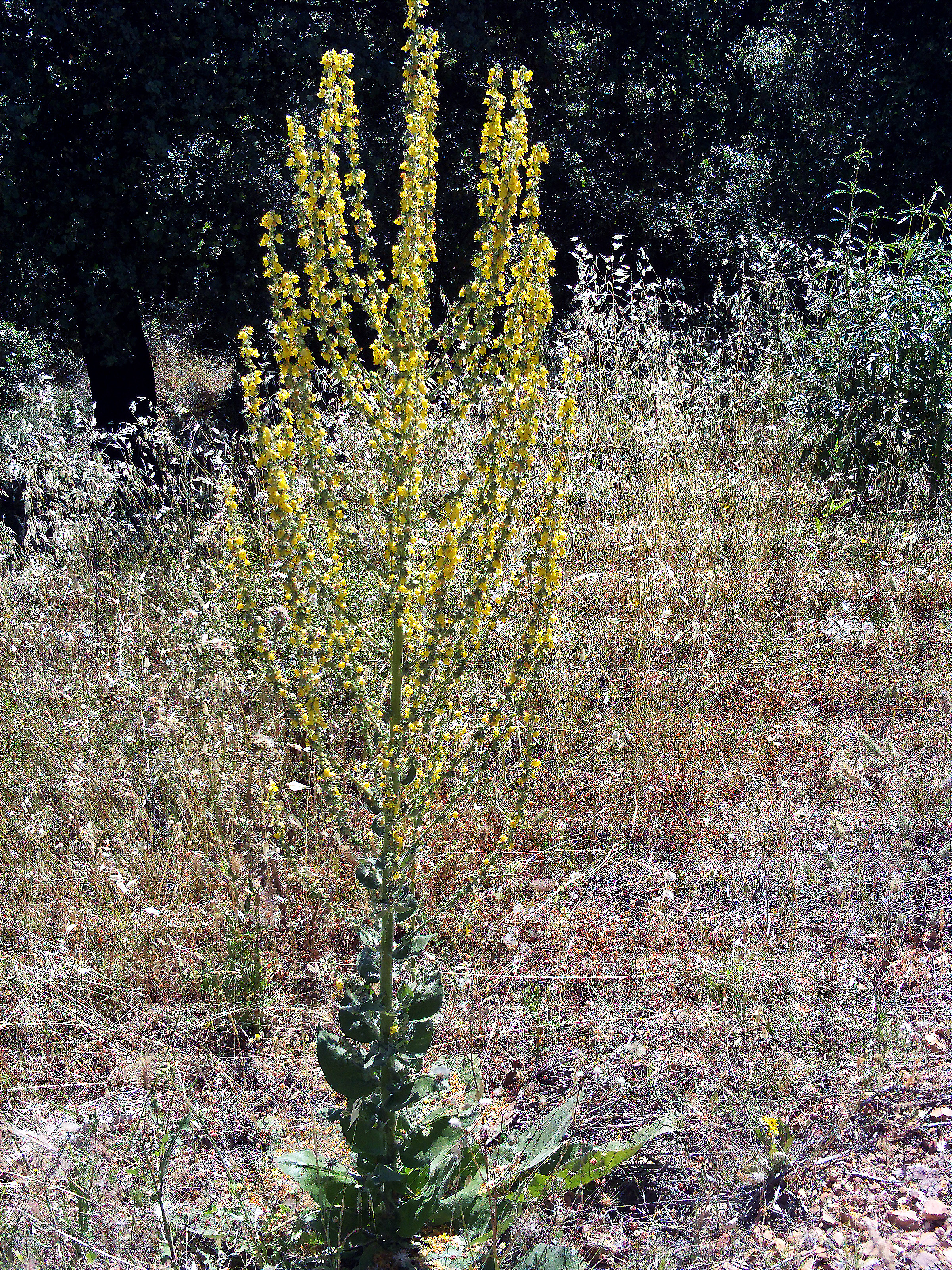 Verbascum pulverulentum Plant Valle de Alcudia